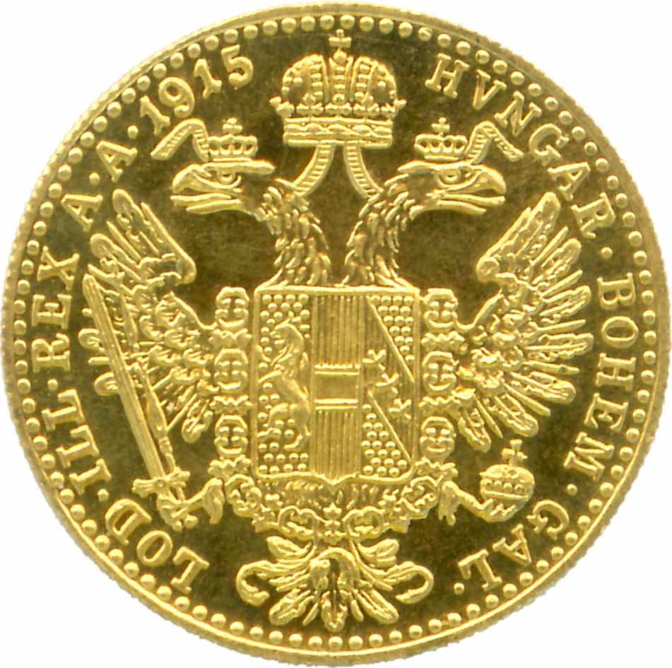 Österreichischer Golddukaten 1-fach, Rückseite